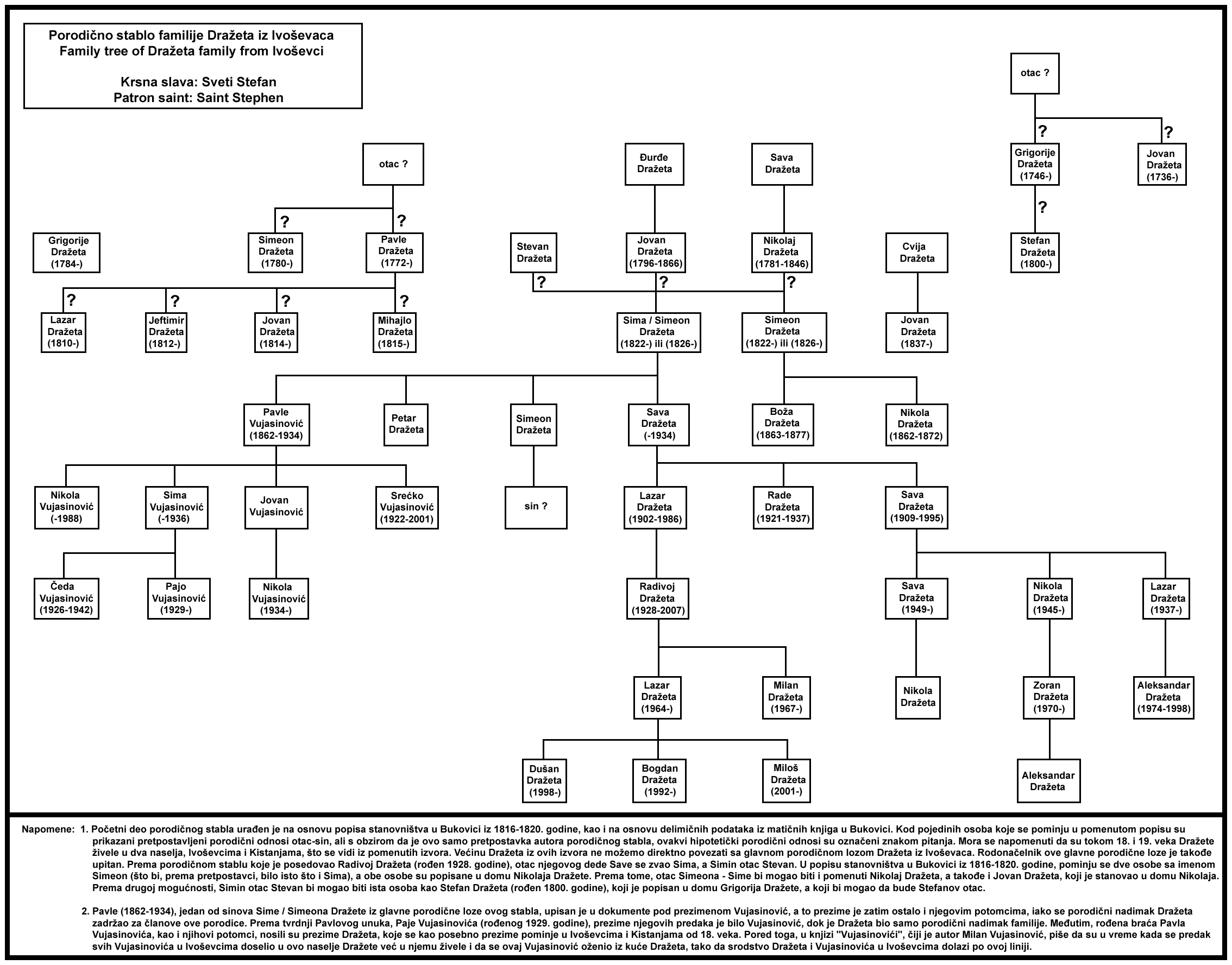 Porodično stablo familije Dražeta iz Ivoševaca. / Family tree of Dražeta family from Ivoševci. Ja sam autor. / I am author.